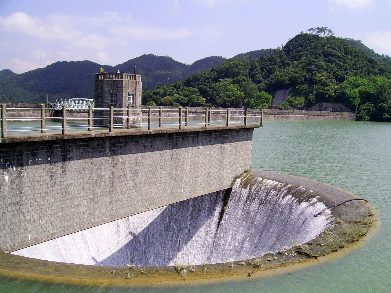 中文（香港）: 城門水塘水掣塔、鐘形溢流口及鐵橋